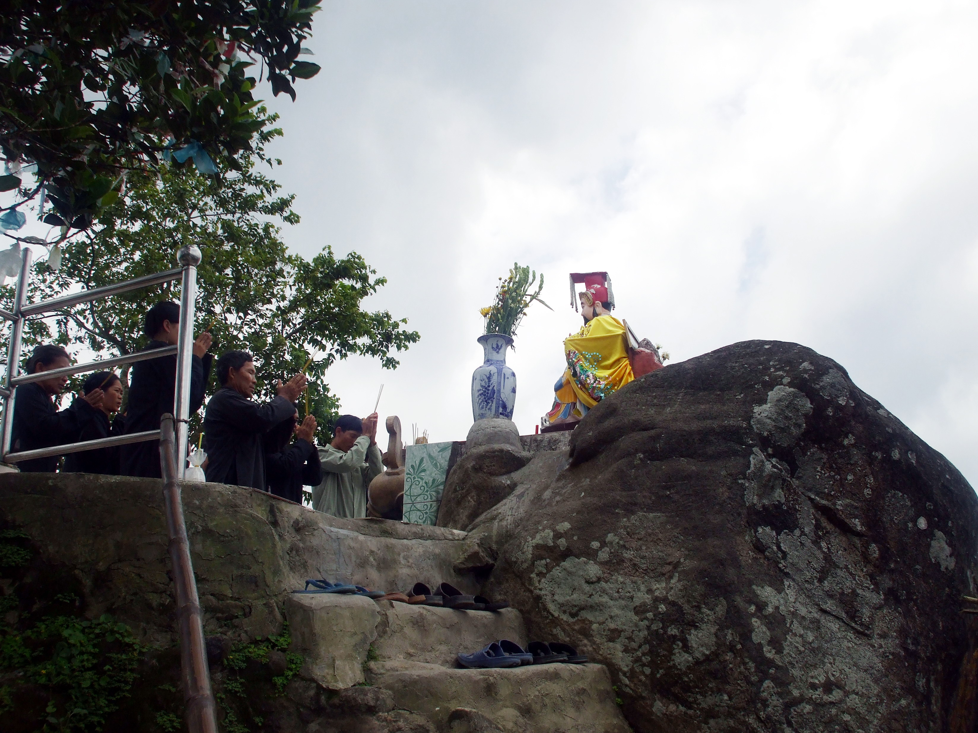 Vồ Bồ Hong trên đỉnh núi Cấm thuộc tỉnh An Giang (Việt Nam).